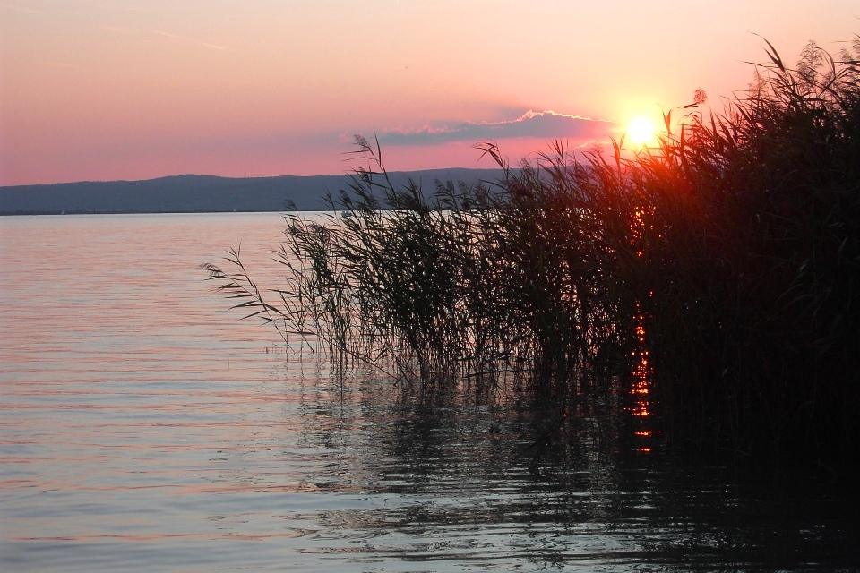 Neusiedler See am Abend